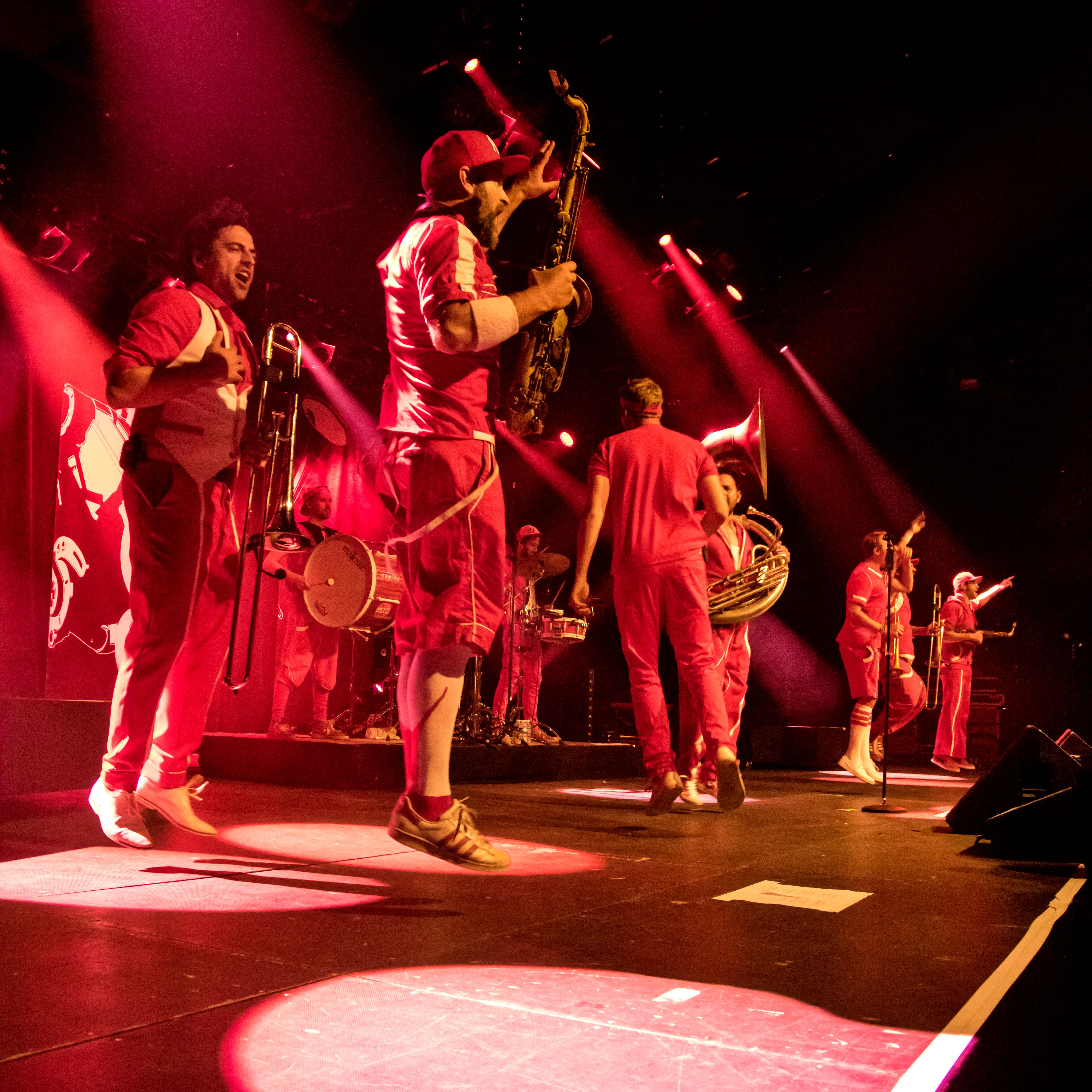 Bilder vom Zelt Musik Festival 2016 in Freiburg im Breisgau Moop Mama (ZMF 2016)